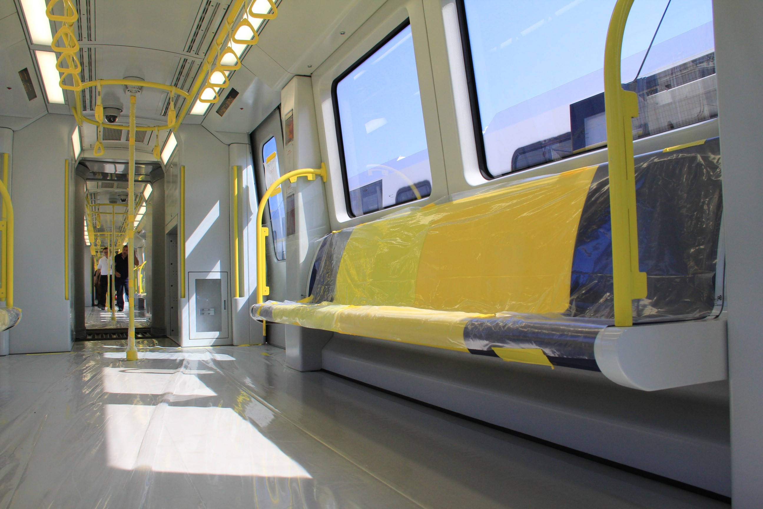 台北捷運環狀線電聯車，照片由新北市政府捷運工程局拍攝。